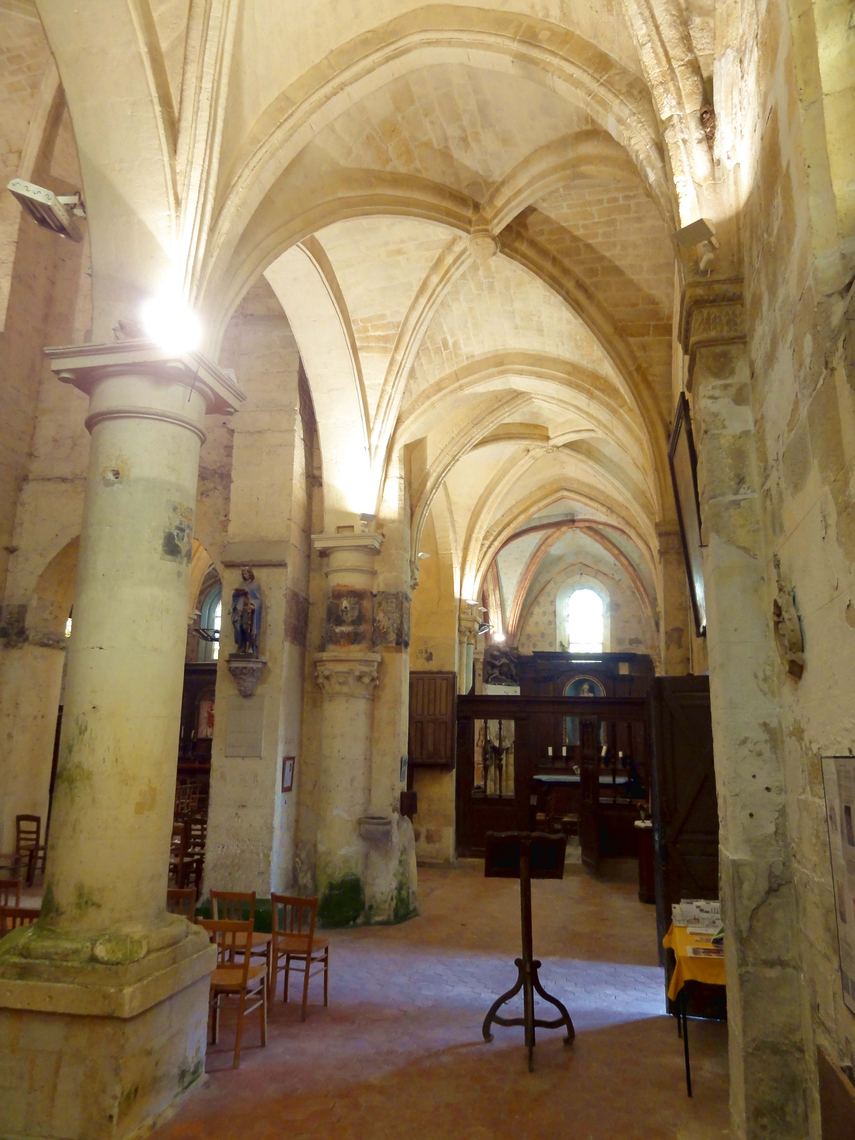 Intérieur de l'église (voir titre).